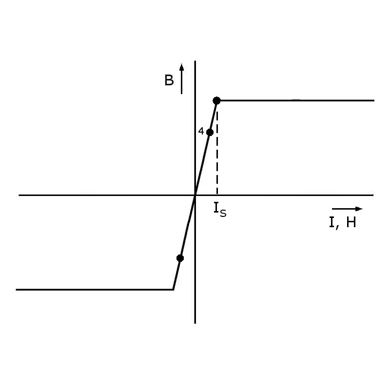 Magnetisierungskennlinie für den Gegentaktbetrieb einer Transduktors